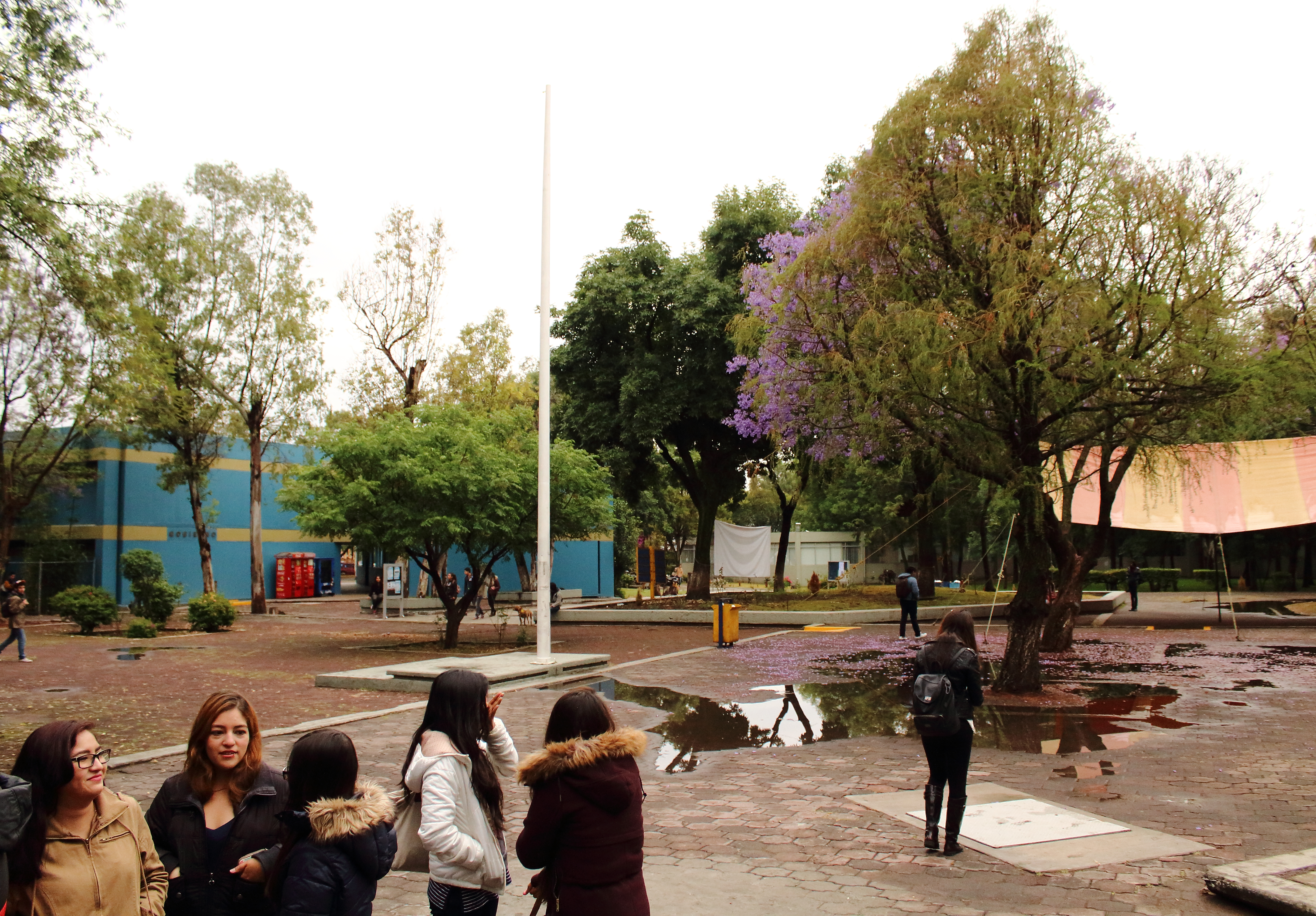 Vista del edificio de Gobierno de la FES-C.